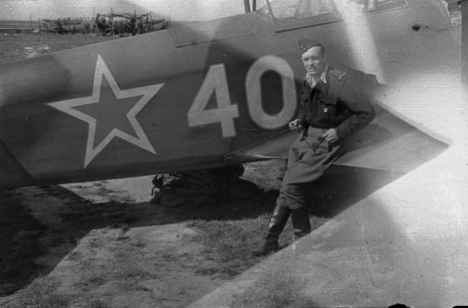 Roger Penverne sur l'aile de son Yak, le n° 40